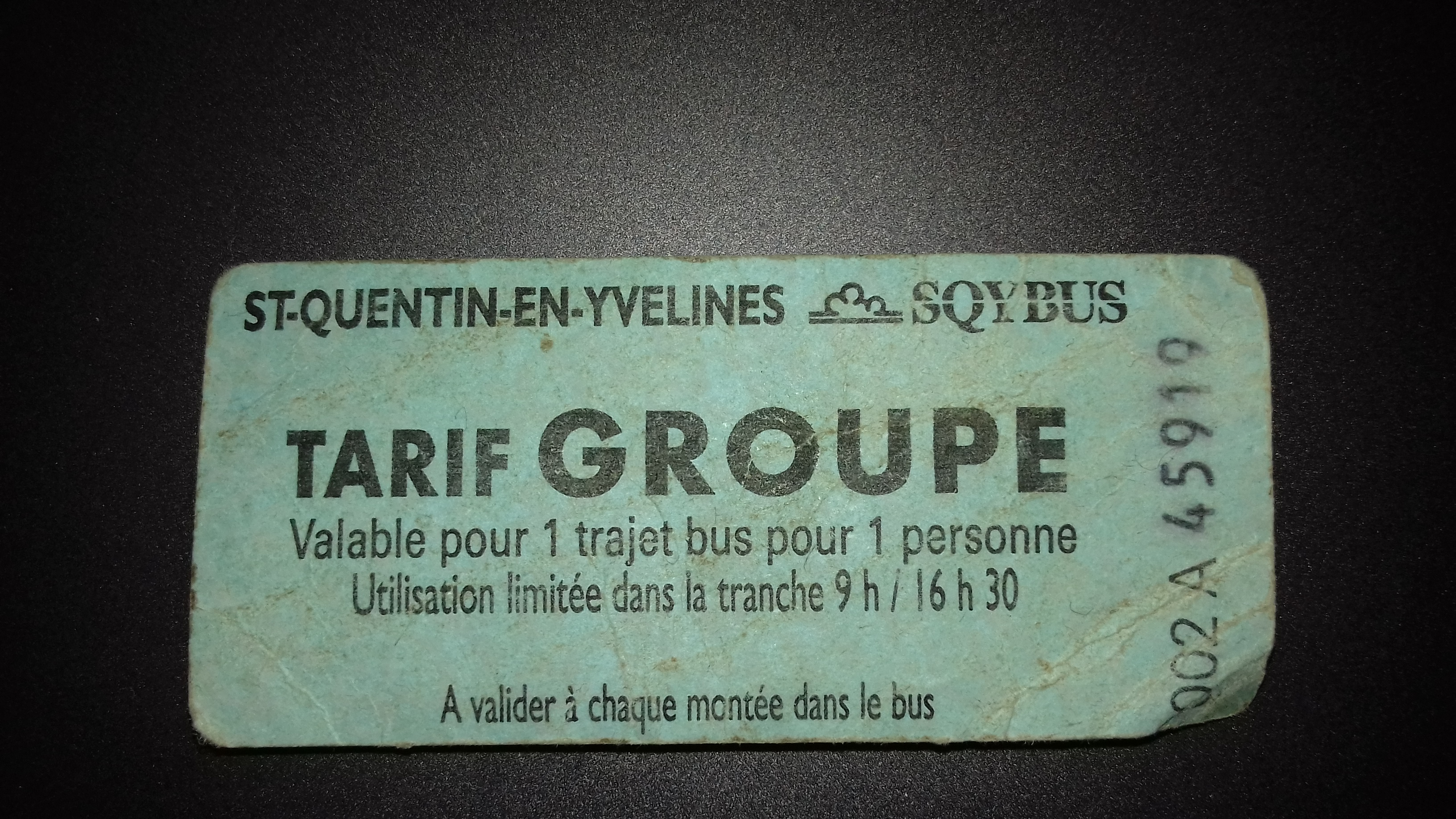 Ticket de voyage de groupe de la compagnie Yvelinoise Sqybus, composté en date du 9 mars 2005.